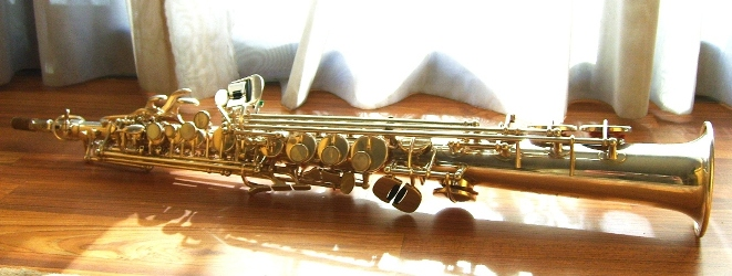 Sopran Sax E_di_e